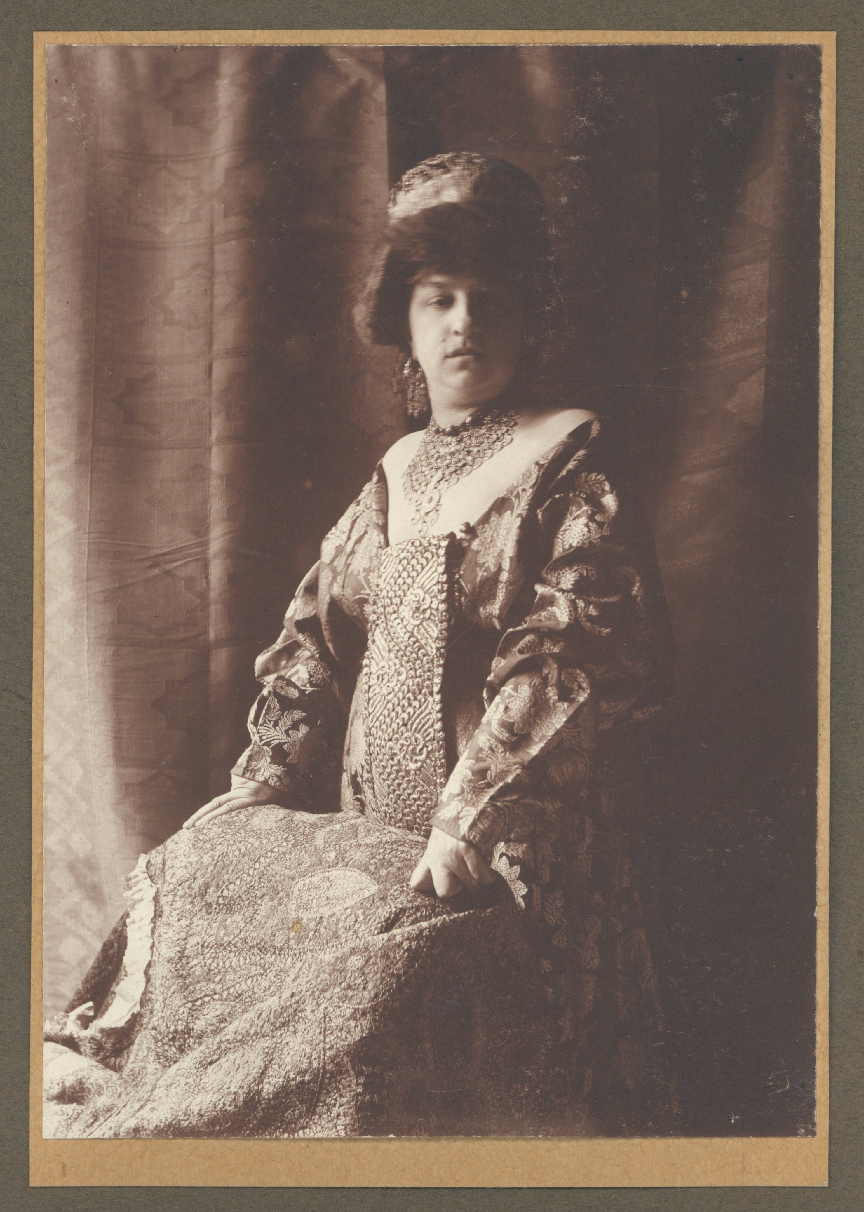 Helena Dąbczańska